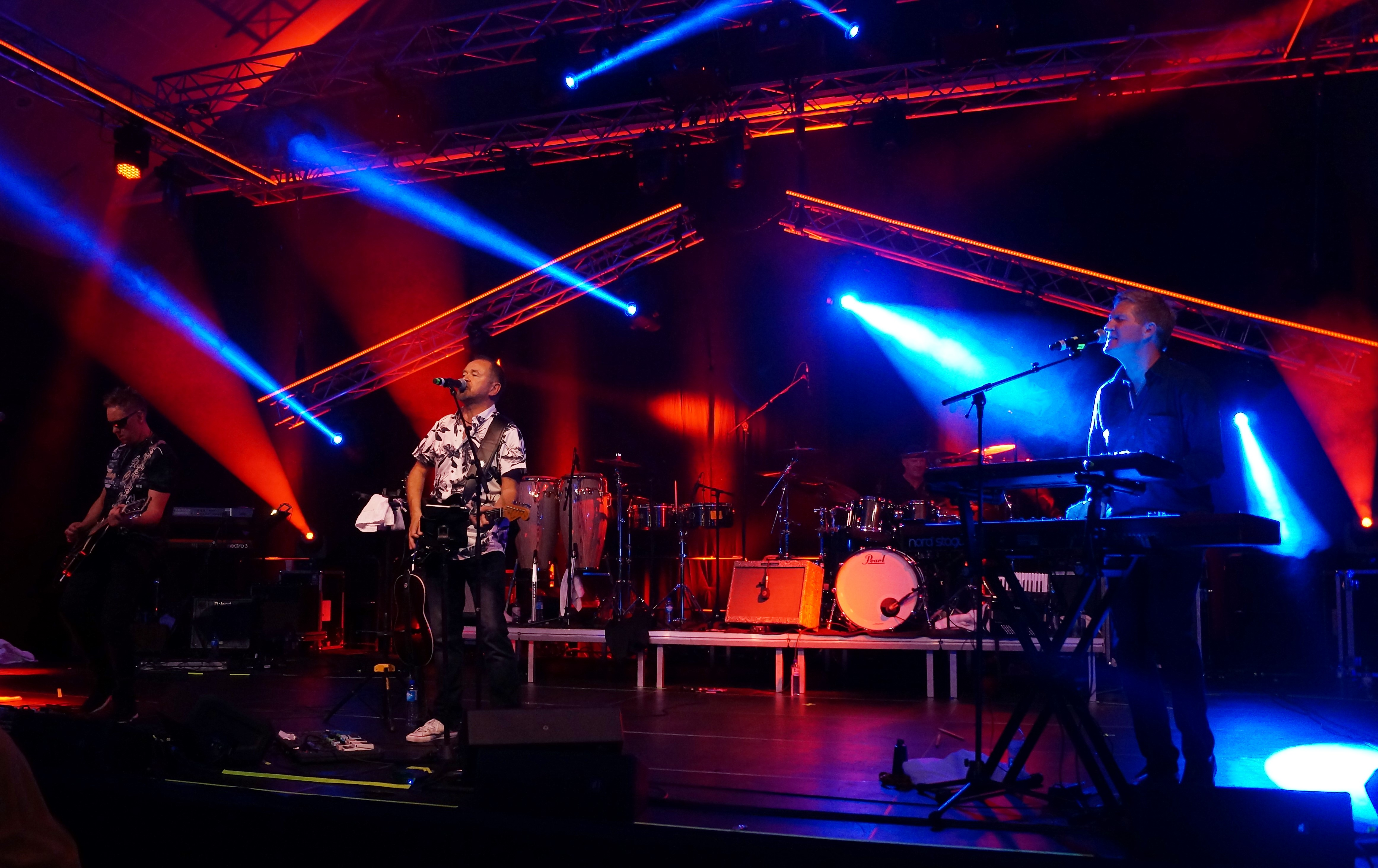 Splint spiller til dans på Panorama Hotell & Resort